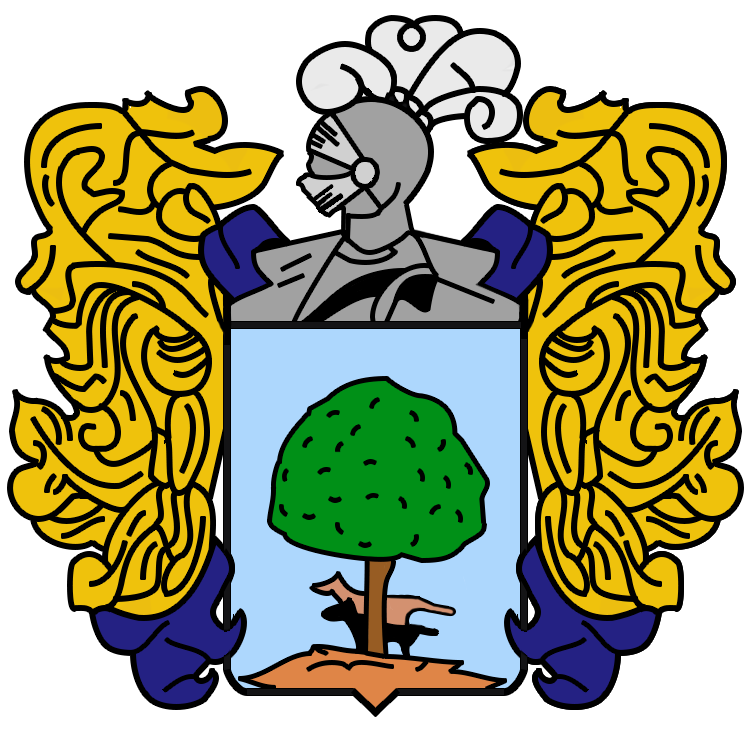 Esta imagen es la del escudo del distrito de chancay, edita para su ajuste por mi persona, es de dominio publico pues no tiene derechos de autor al ser un escudo estatal